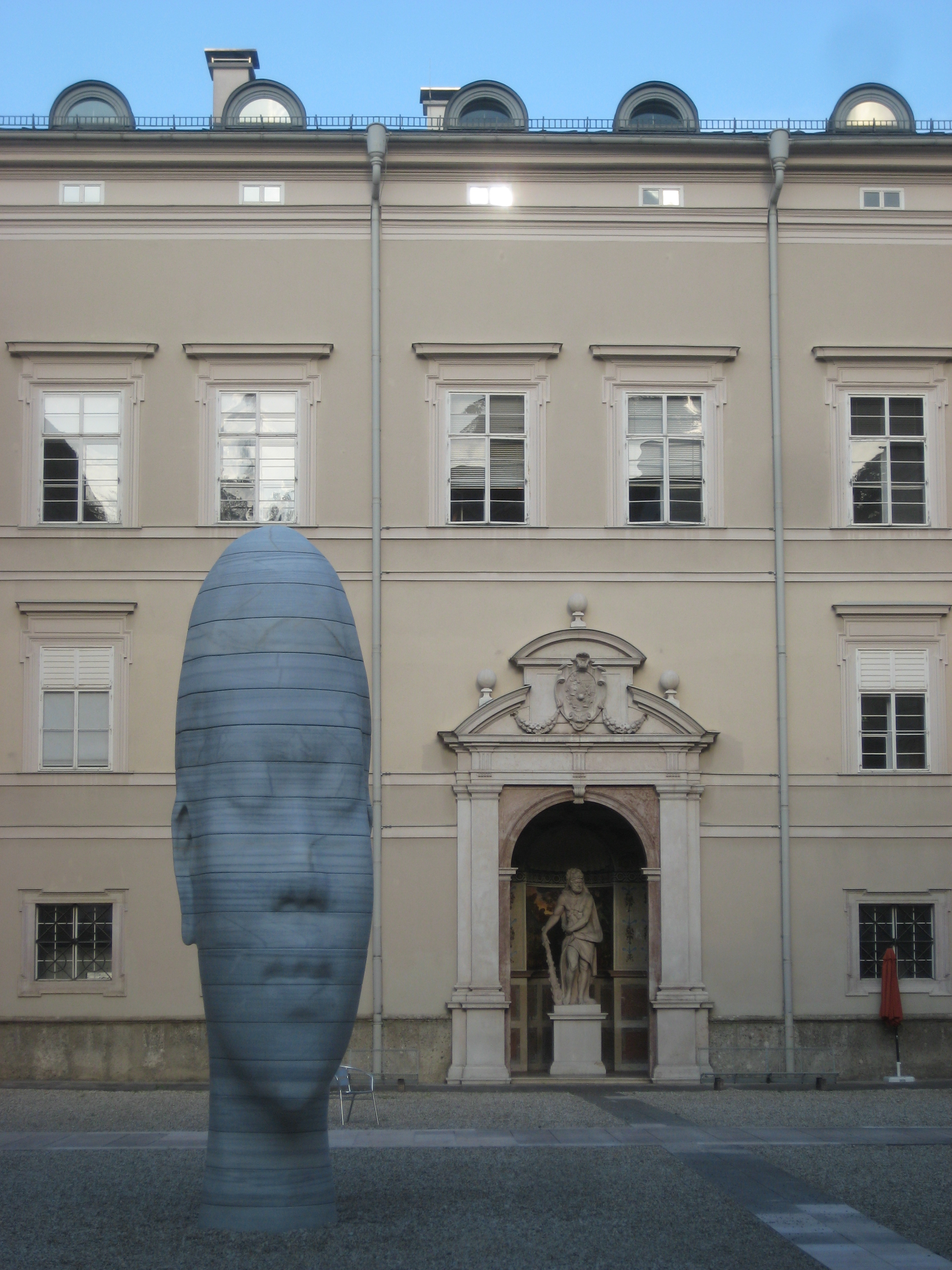 Marmorkopf "Awilda" von Jaume Plensa, Hof im Toskanatrakt der Salzburger Residenz, Dietrichsruh der Universität Salzburg, Rechtswissenschaftliche Fakultät